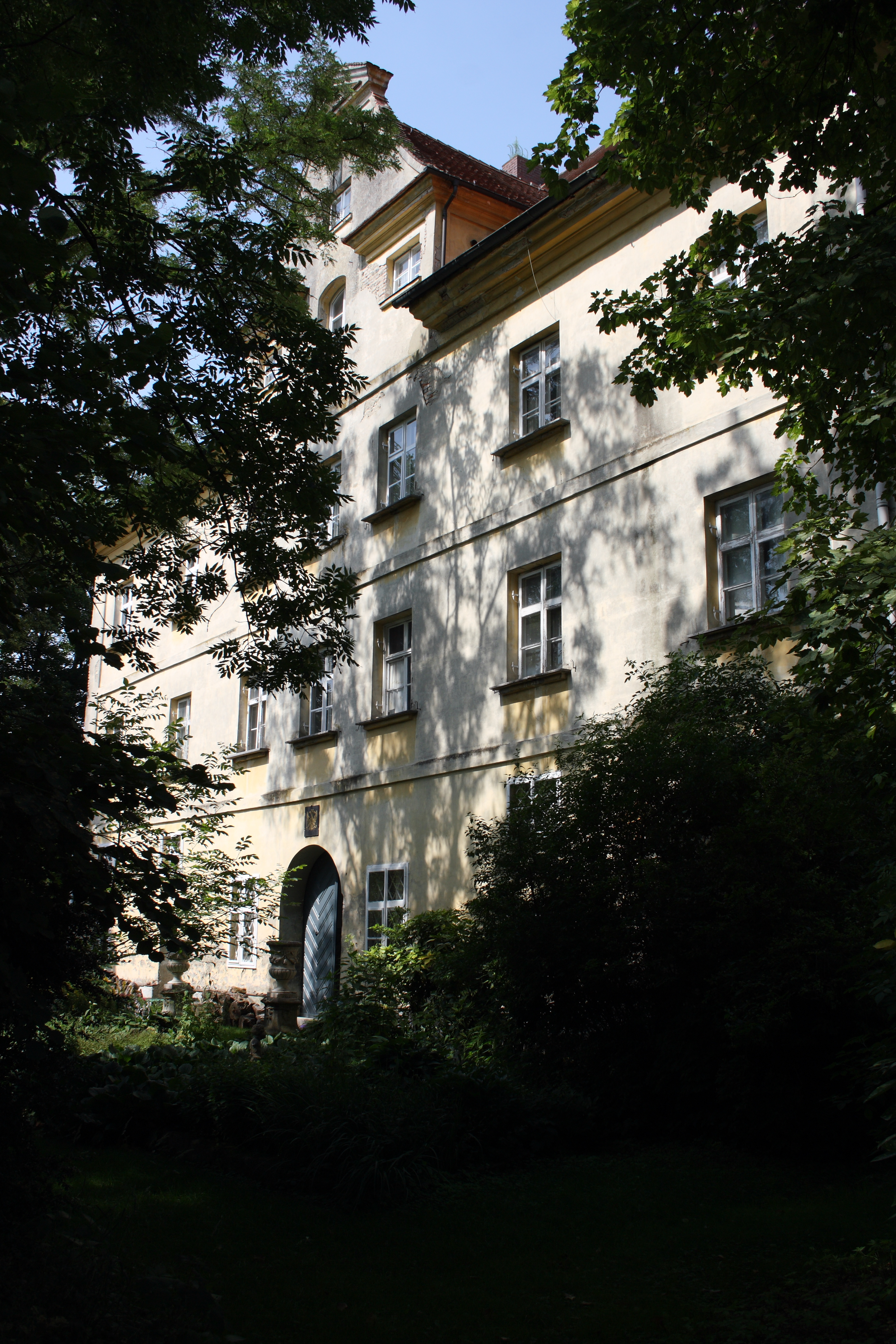 Schloss Autenried in Autenried, einem Ortsteil von Ichenhausen im Landkreis Günzburg (Bayern), ursprüngliches Wasserschloss (16. Jahrhundert), 1709 Neubau durch Johann Georg Reiner